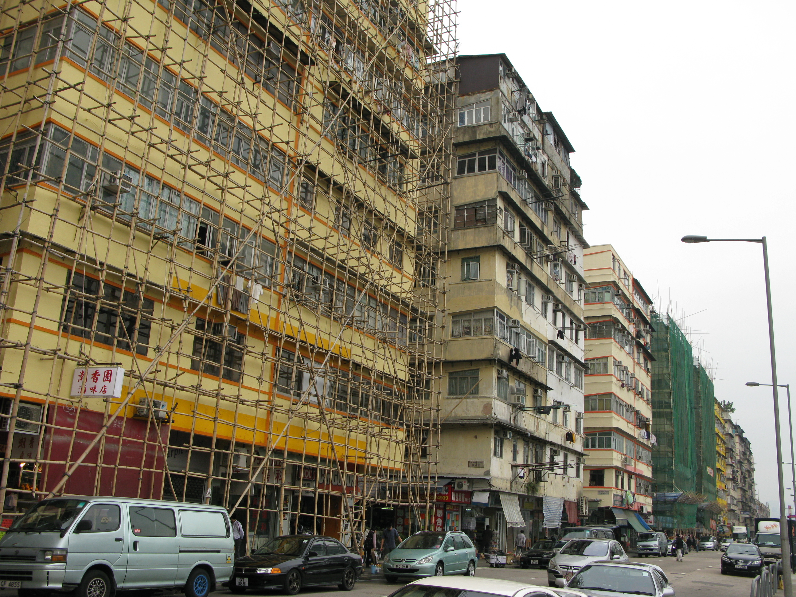 中文（香港）: 香港九龍土瓜灣十三街側視圖